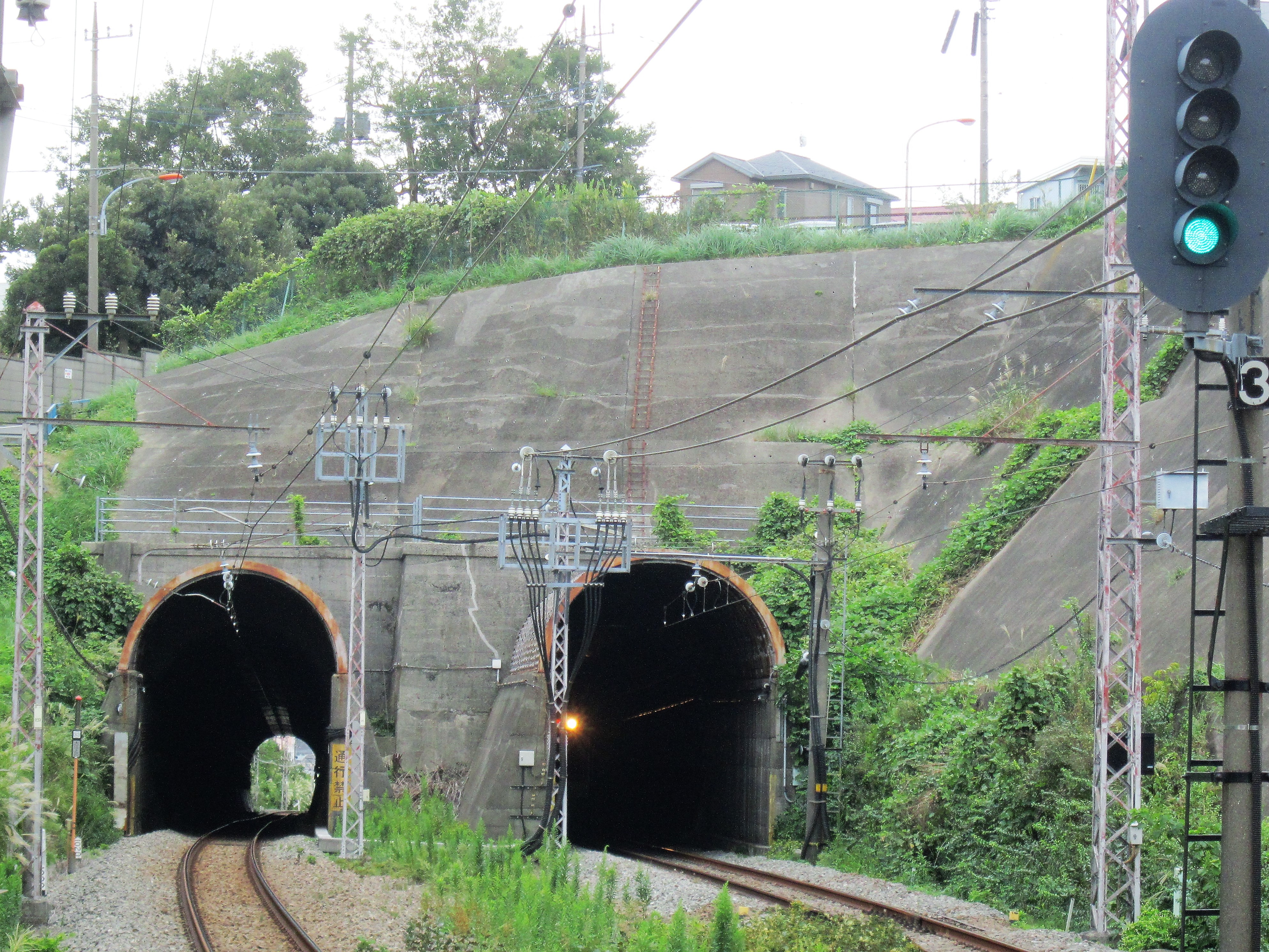 善行駅南側にある小田急江ノ島線のトンネル